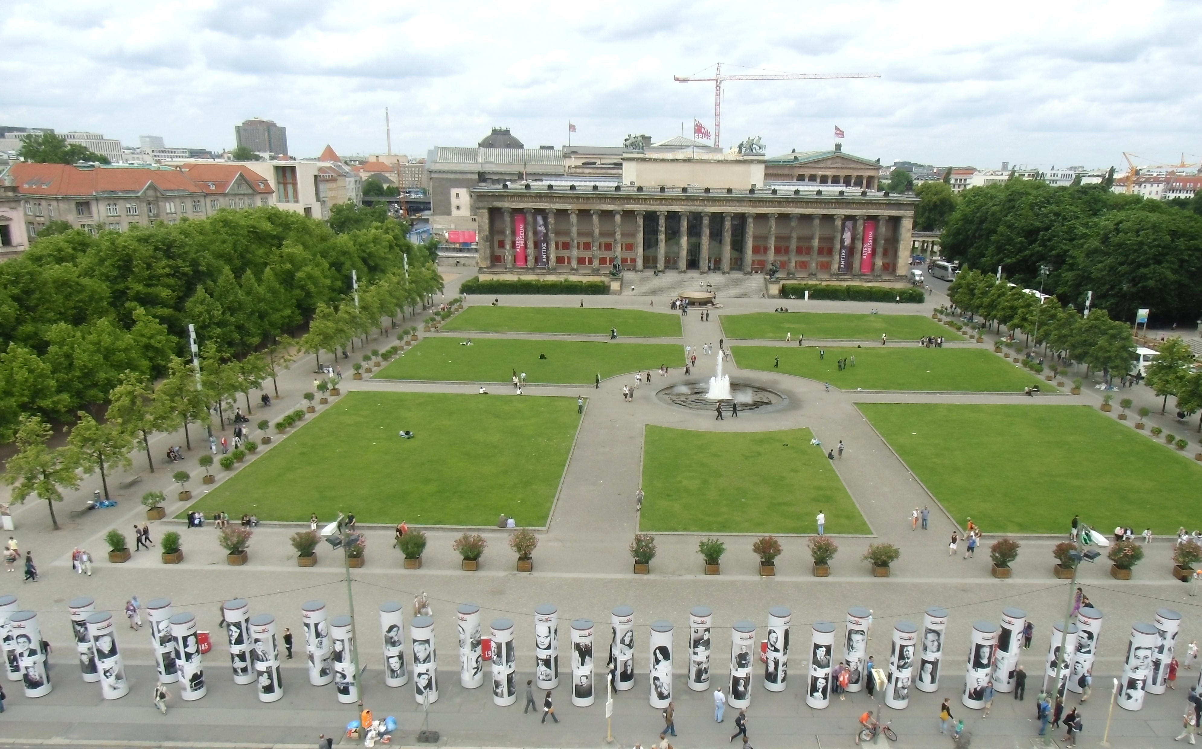 Blick von der Humboldt-Box auf den Lustgarten von Berlin, in der heutigen Form zwischen 1828 und 1833 nach Plänen von Karl Friedrich Schinkel und Peter Joseph Lenné gestaltet